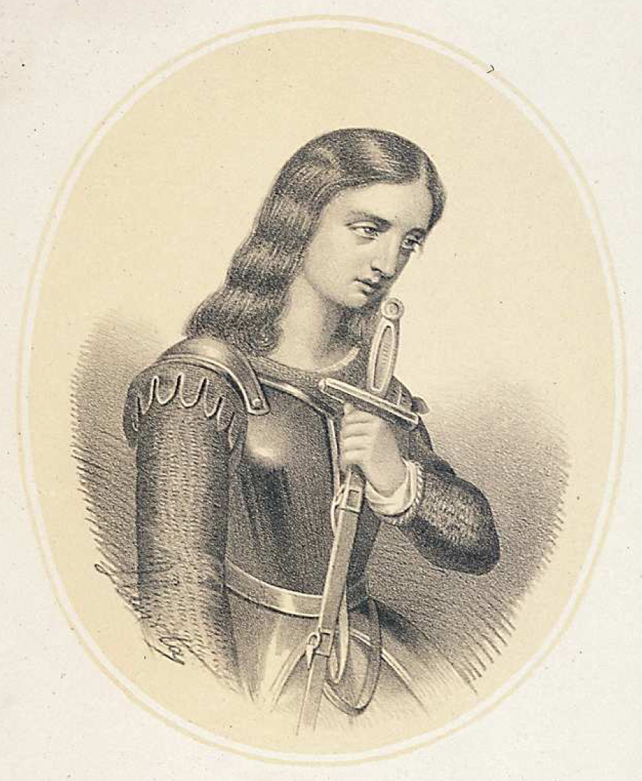 María Pita, estampa obra de Santiago Llanta y Guerin.